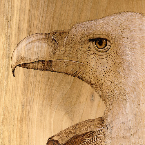 Pyrogravure d'un vautour